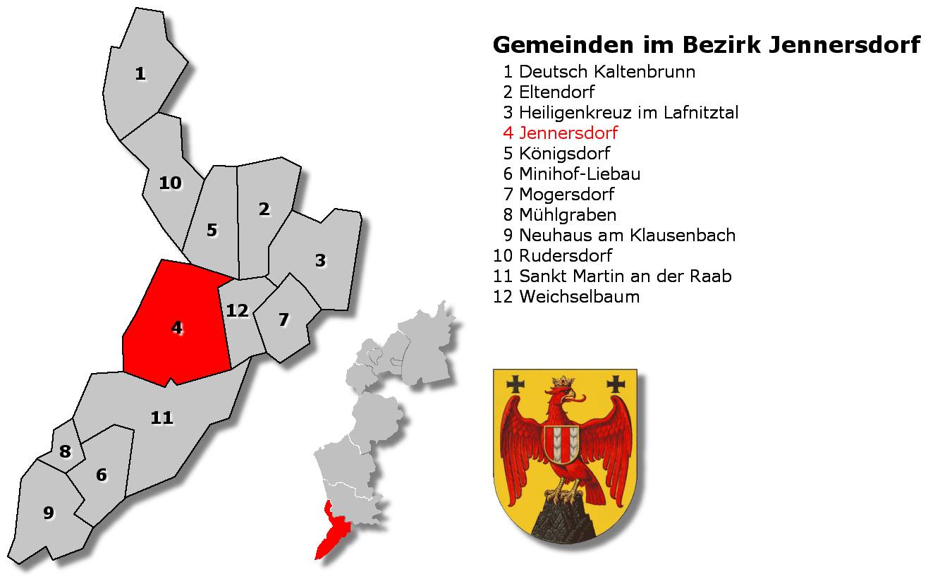 Gemeindekarte Bezirk Jennersdorf (Burgenland, Österreich)